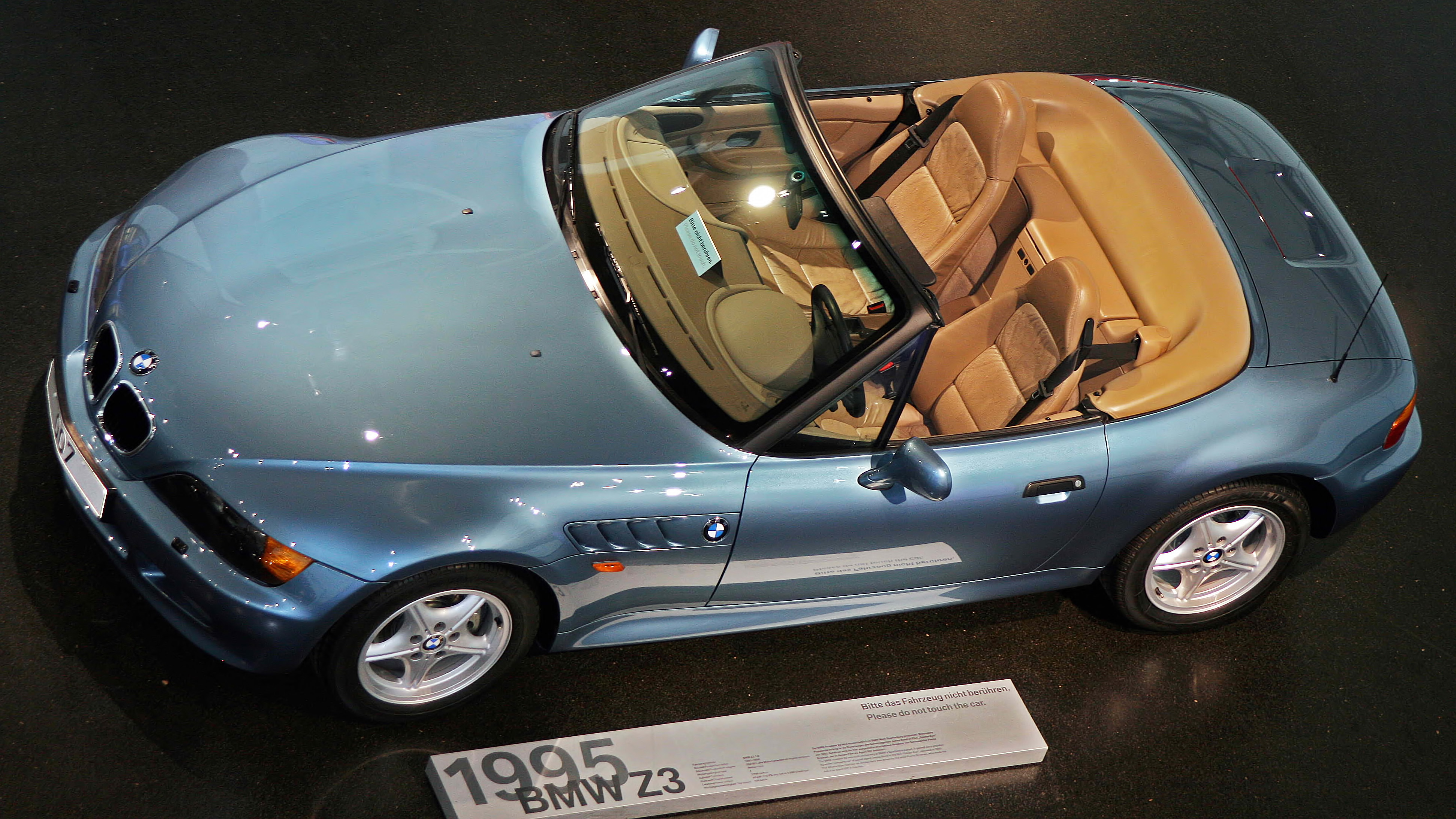 James Bond Edition des BMW Z3 Roadsters im BMW Museum München